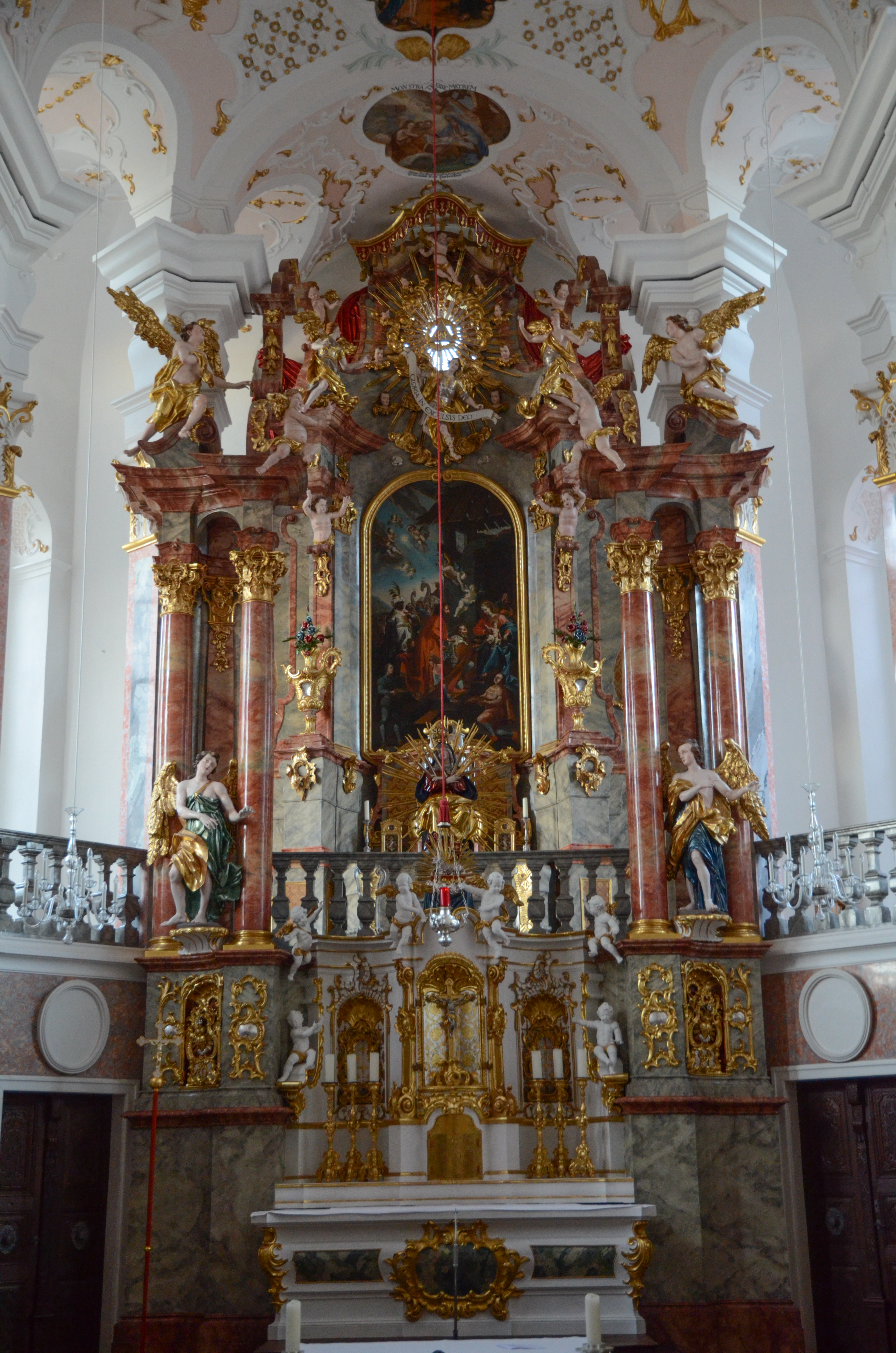 Günzburg, Zu Unserer Lieben Frau, Interiror